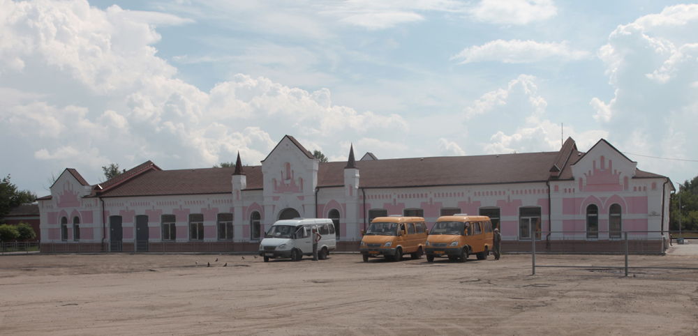 Здание вокзала в городе Козельск Калужской области